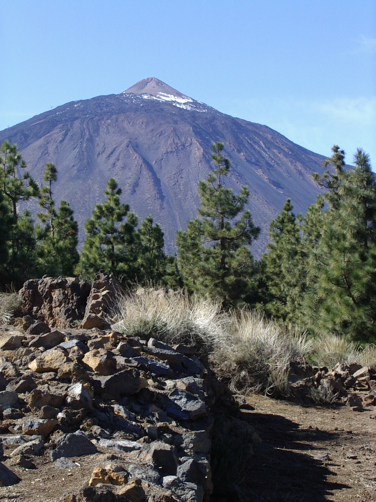 Der Teide auf Teneriffa